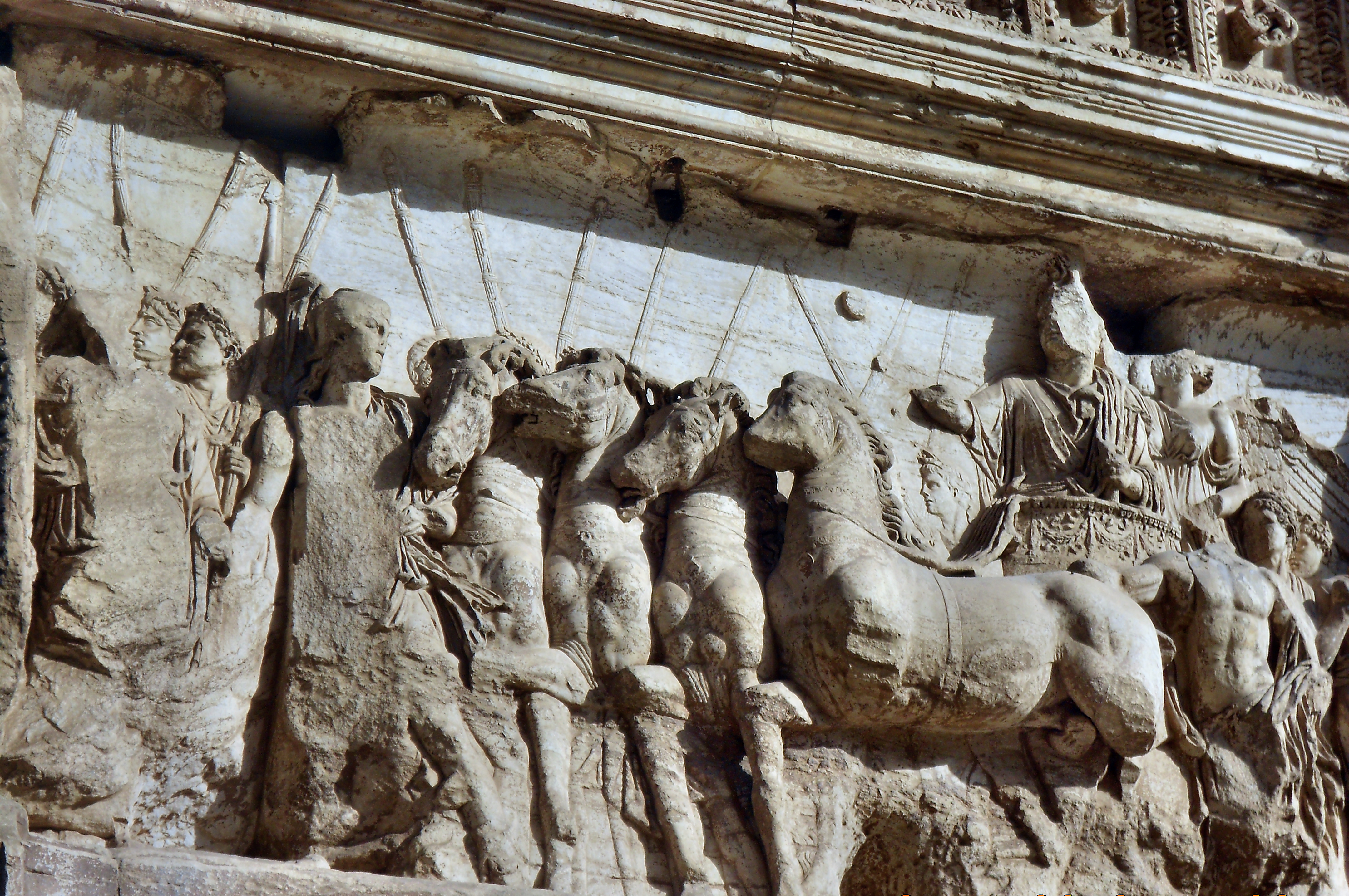 Rechtsseitiges Bogenrelief des Titusbogens zum Eingang des Forum Romanum.